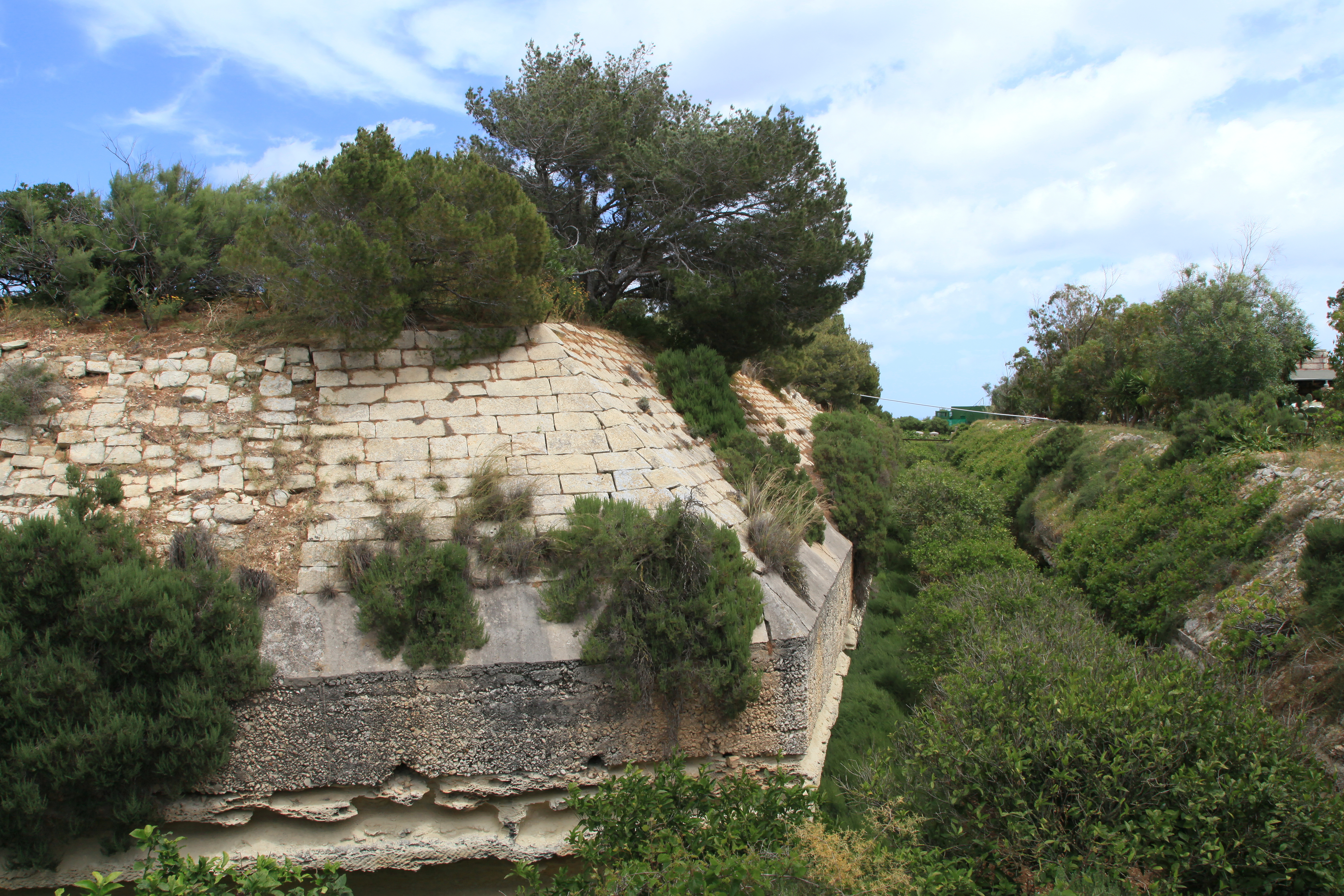 Fort Tas-Silġ, Triq Delimara in Marsaxlokk, Malta